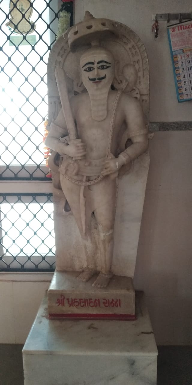 ગુજરાતી: પલ્લવીયા પાર્શ્વનાથ મોટા દેરાસર, પાલનપુર ખાતે આવેલી રાજા પ્રહલાદનની મૂર્તિ.